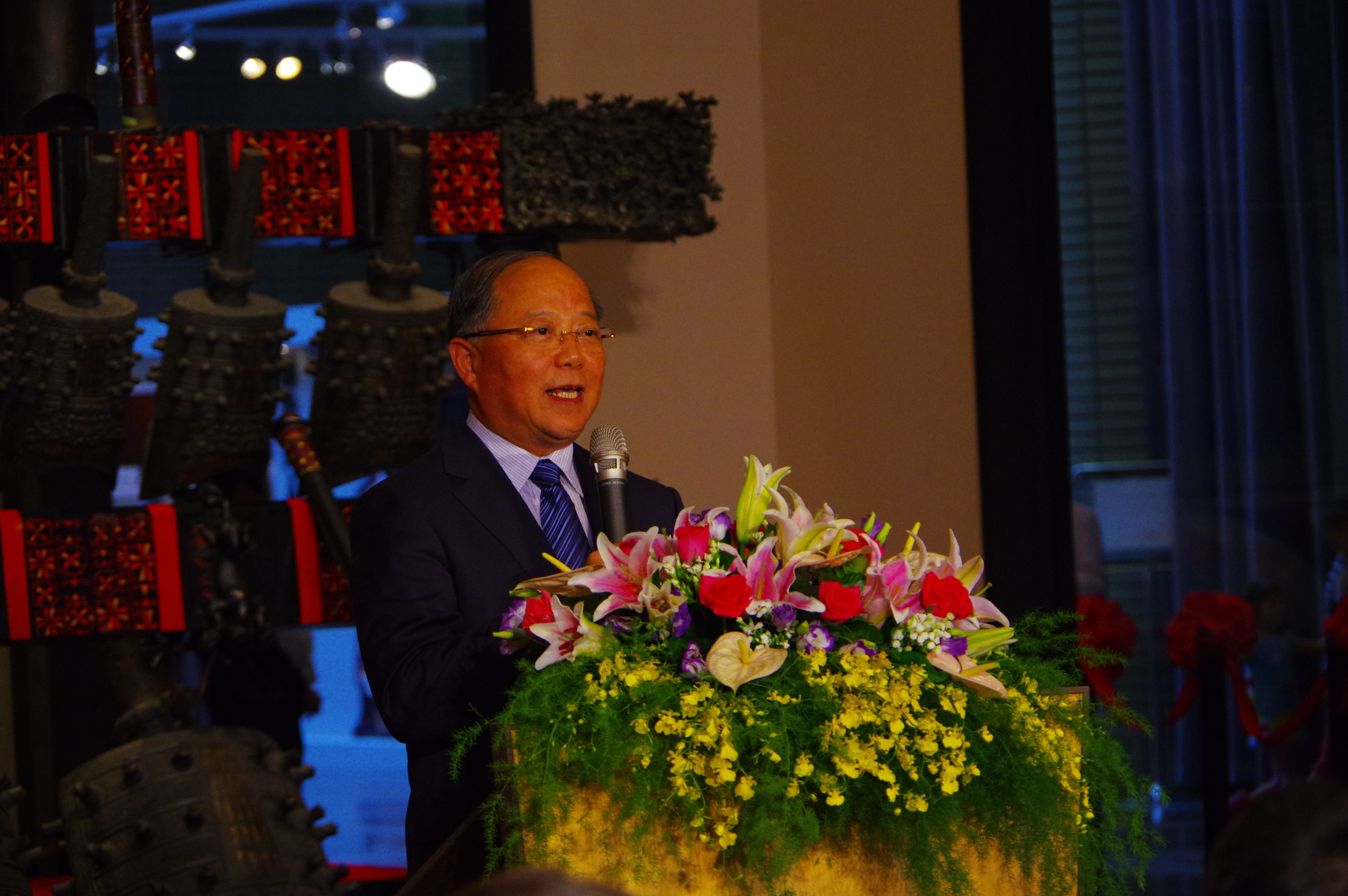 中華文物交流協會會長勵小捷。